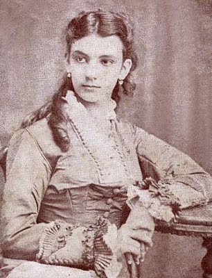 María Garcia Granados. En 1875, Martí estuvo en Guatemala y cortejó a la dama María Garcia Granados y Saborío, quien murió poco después. Martí la inmortalizó en el poema La Niña de Guatemala.